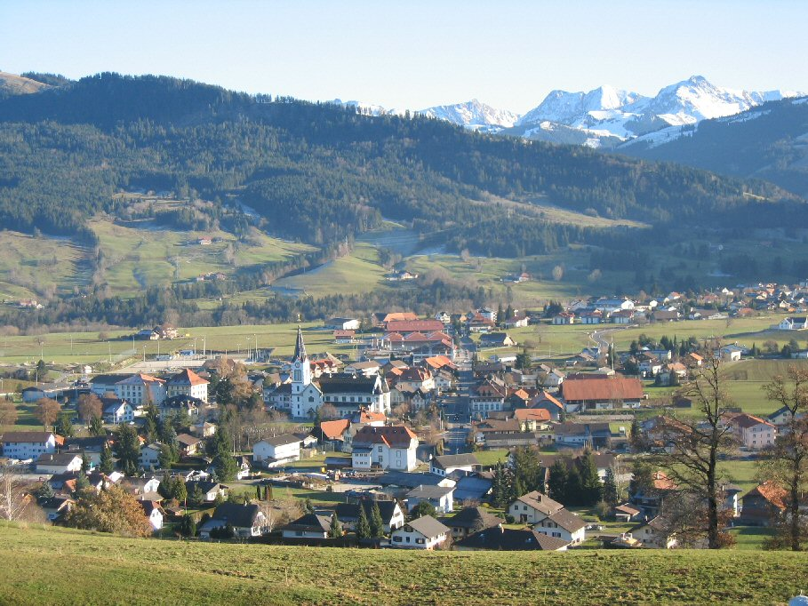 Plaffeien